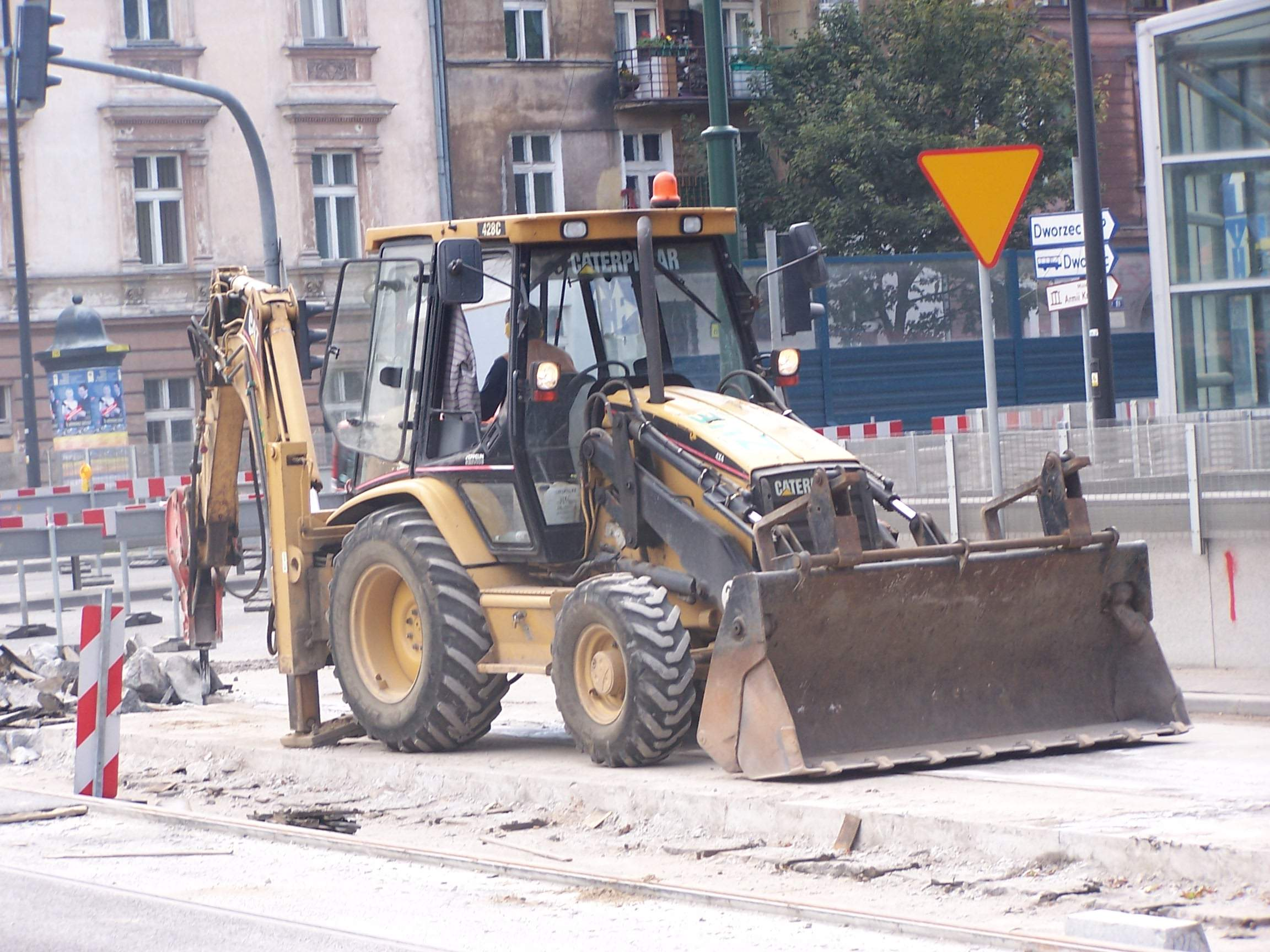 Photo by Piotrus. Caterpillar Inc. building machine. Kraków, Rakowiecka street, mid-2006.